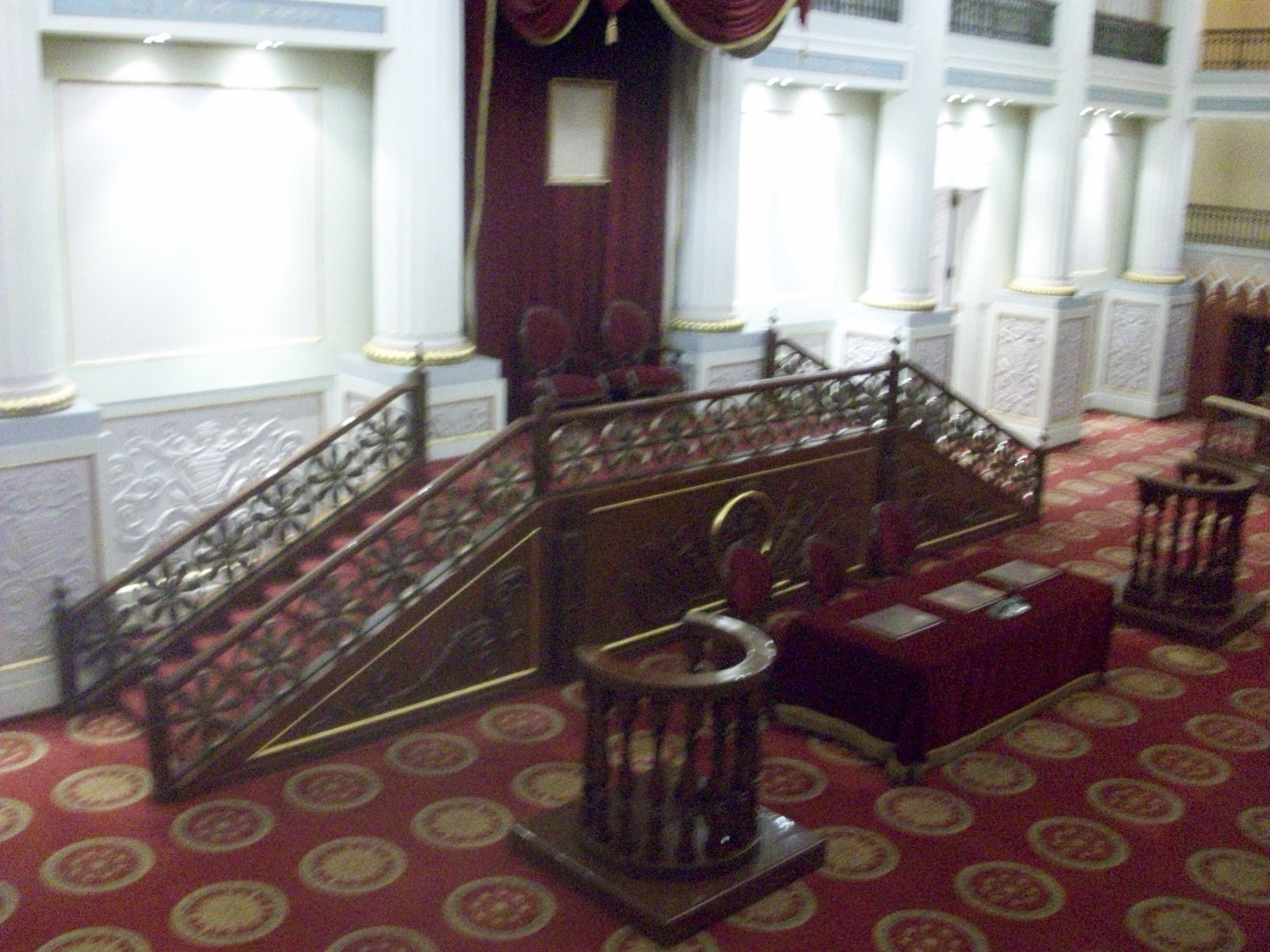 Palacio Nacional